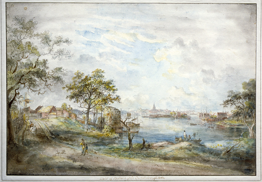 View towards Stockholm from Ryssviken (Russians' Bay) near Waldemarsudde at Djurgården park area in Stockholm. Watercolour by Elias Martin, from 1790-1800. Vy mot Stockholm från Ryssviken nära Waldemarsudde på Djurgården i Stockholm. Akvarell av Elias Martin, från 1790-1800. Collection: The Rosenhane Collection, Library of Swedish National Heritage Board (Vitterhetsakademiens bibliotek ). Parish (socken): Stockholm Province (landskap): Uppland Municipality (kommun): Stockholm County (län): Stockholm Photograph by: Jan Eve Olsson Date: 1995 Persistent URL: Read more about the photo database (in english)